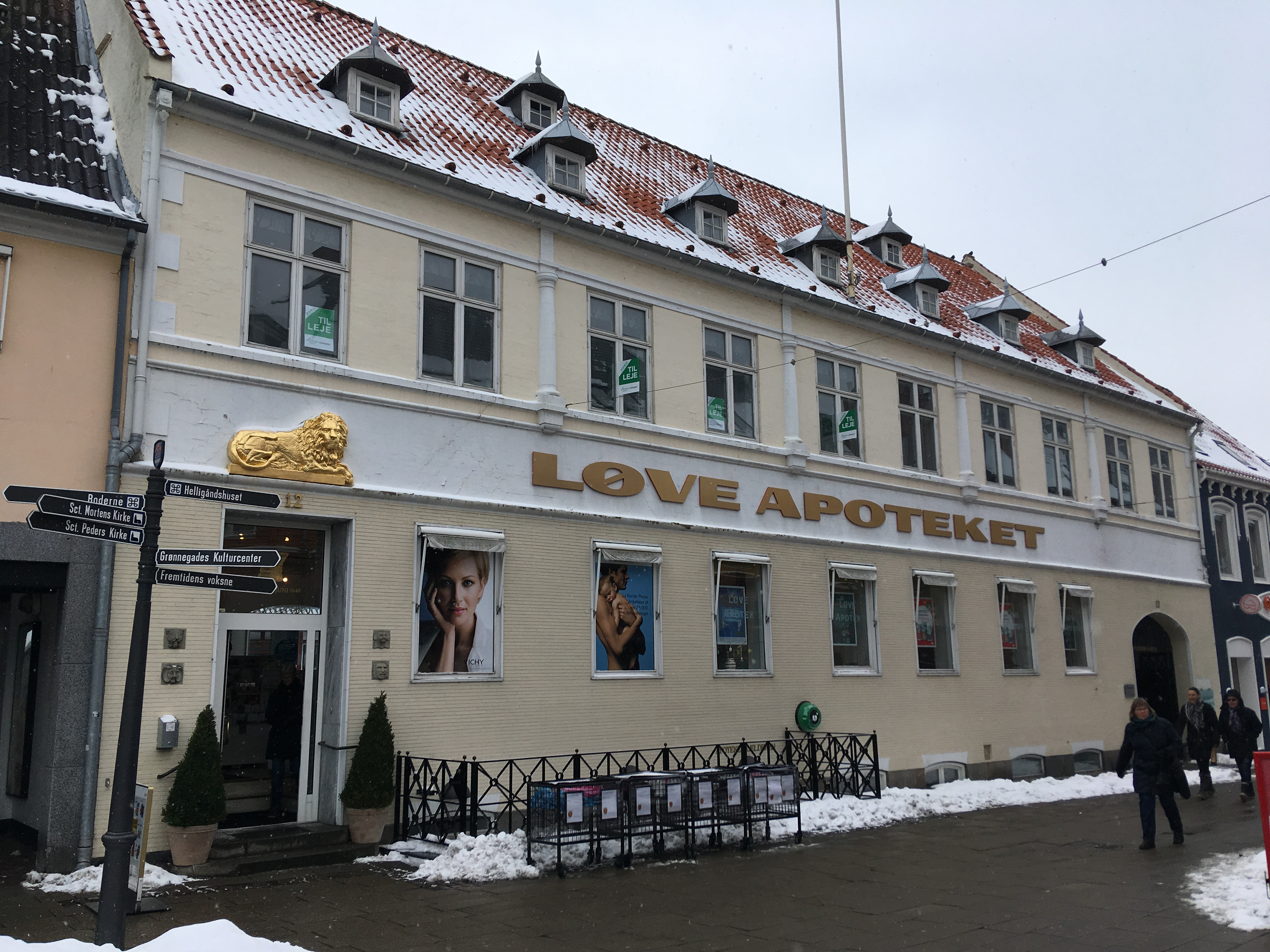 På Axeltorv i Næstved